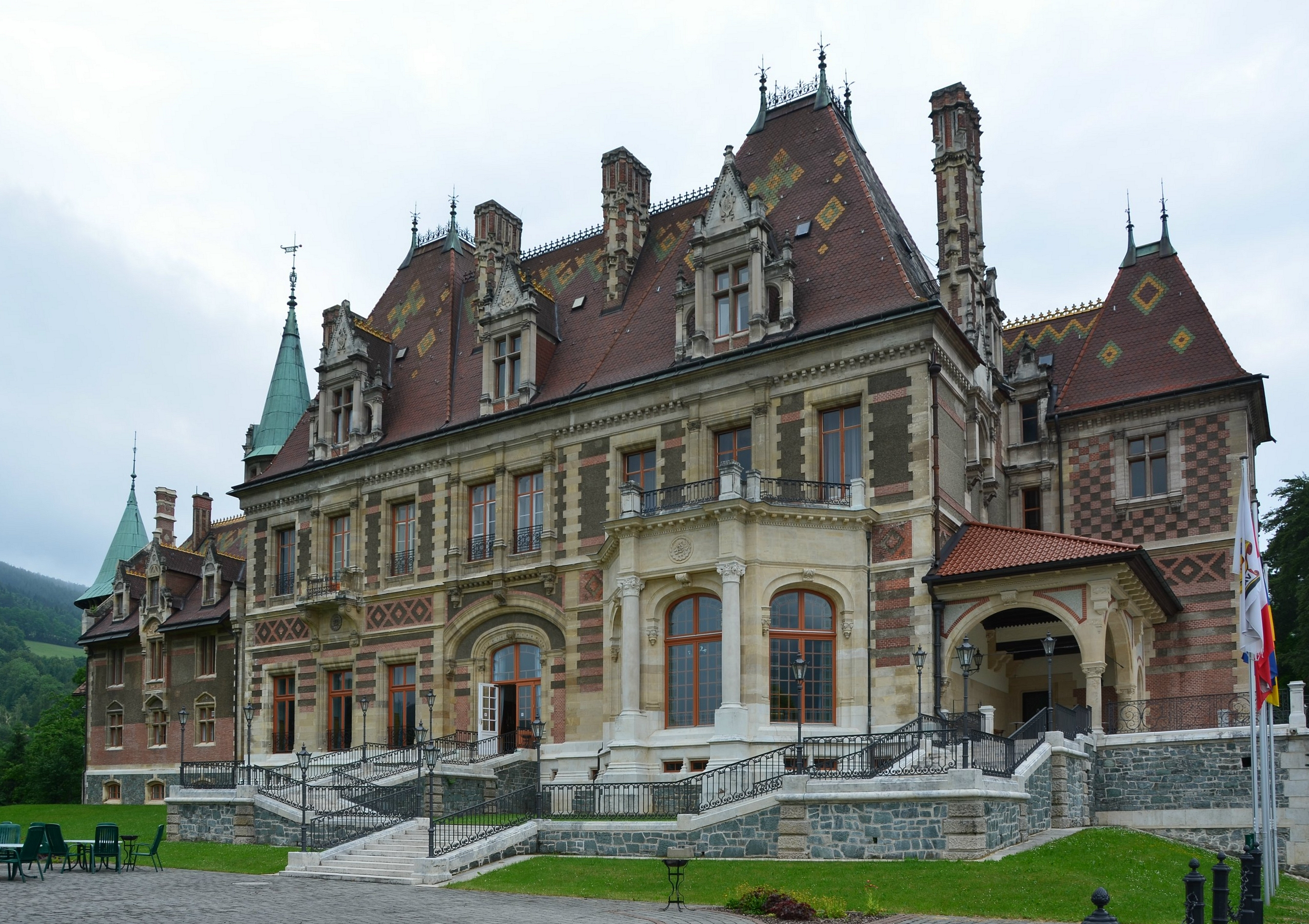 Rothschild Schloss, Reichenau an der Rax, Austria, photographed by A. Wintschalek using a Nikon D700, 3 June 2011